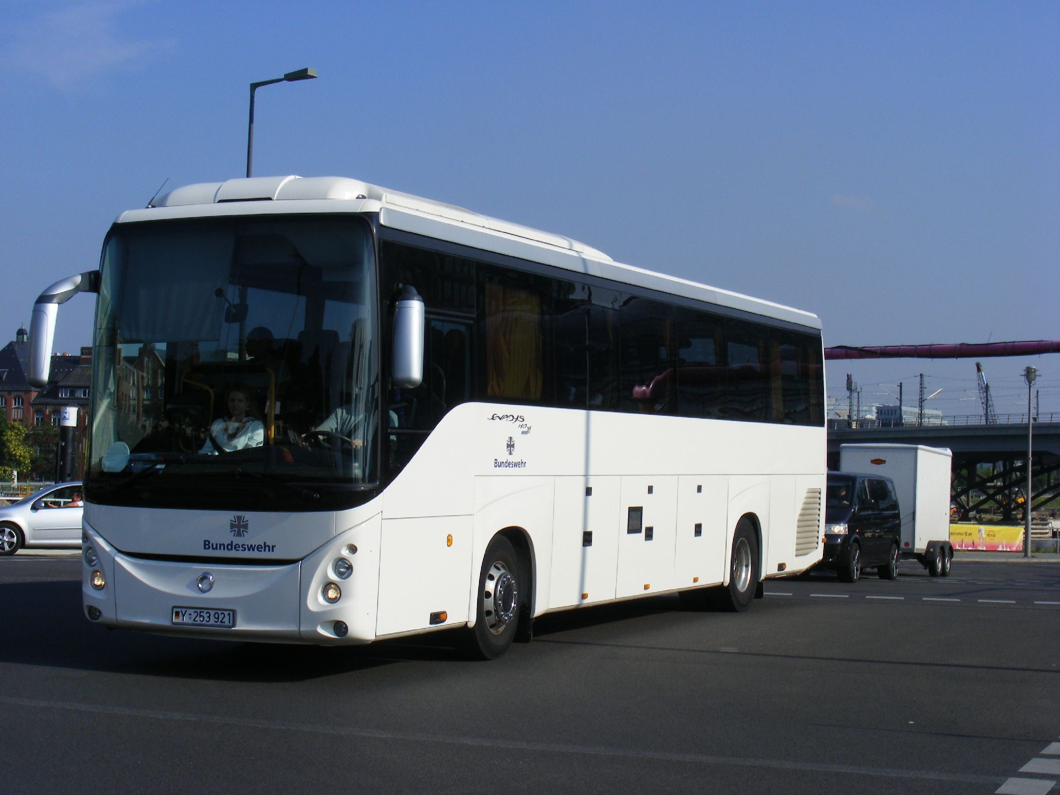 Y-253 921 Irisbus Evadys, Bundeswehr. Berlin.